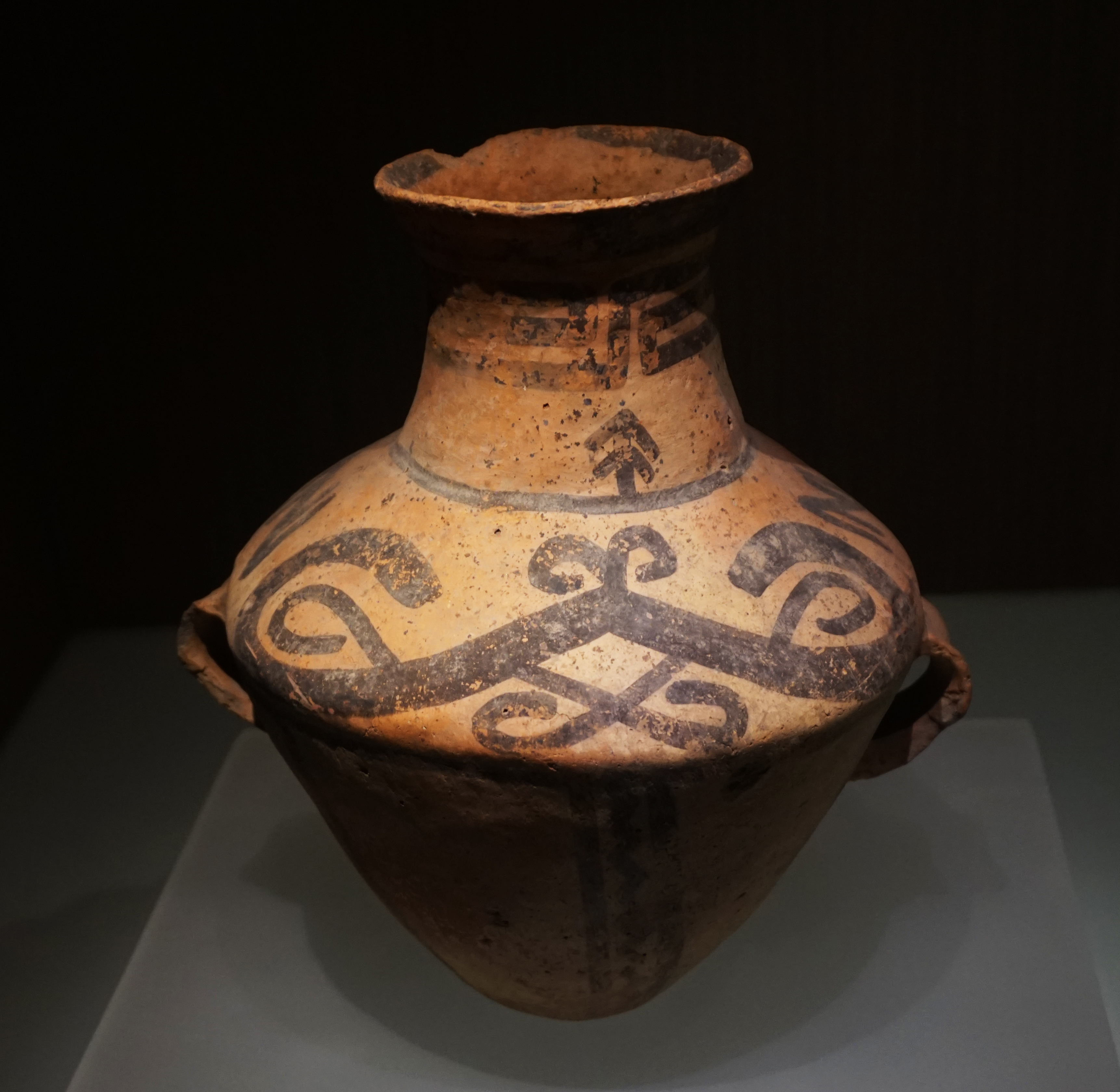 羊角纹壶，辛店文化。